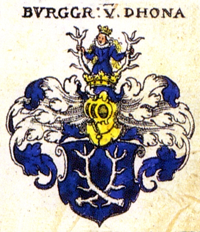 Wappen der Familie Dohna Bearbeitung: HvRandow